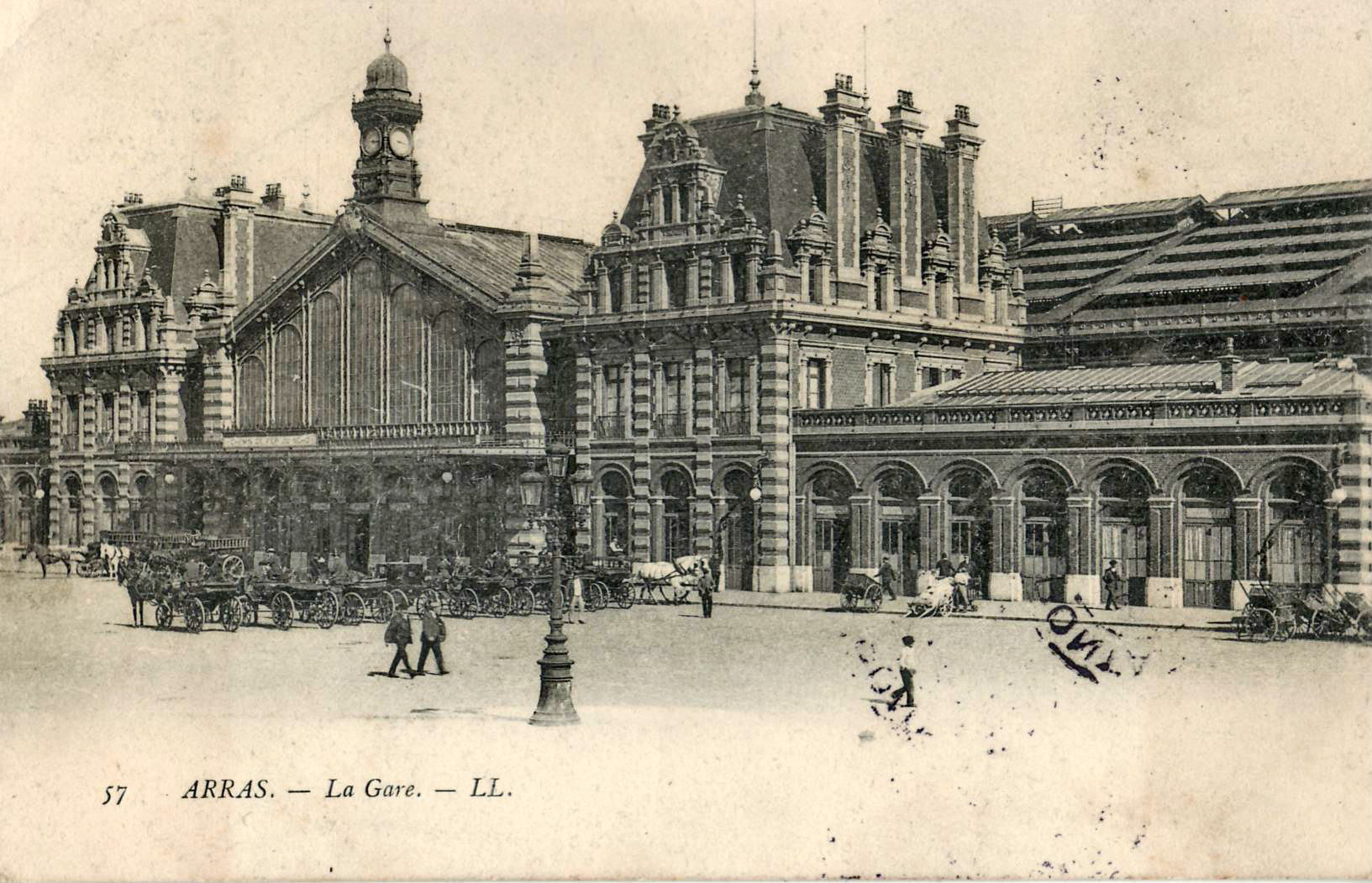 Carte postale ancienne éditée par LL, n°57 : ARRAS - La Gare